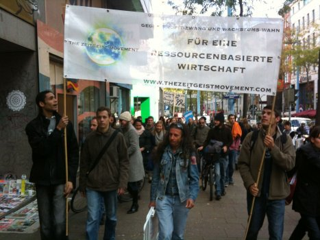 15 Okt Occupy Wien